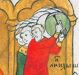 Музыканты, играющие на бубнах. Давид-псалмопевец (фрагмент). Годуновская псалтирь. 1594